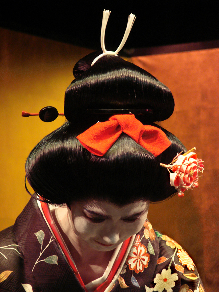 Eiko Hayashi Nihon Buyô – danse du Kabuki (Japon) accompagnée par Nobuko Matsumiya (koto) et Fumie Hihara (koto, shamisen) Auditorium du Musée Guimet samedi 22 novembre 2008